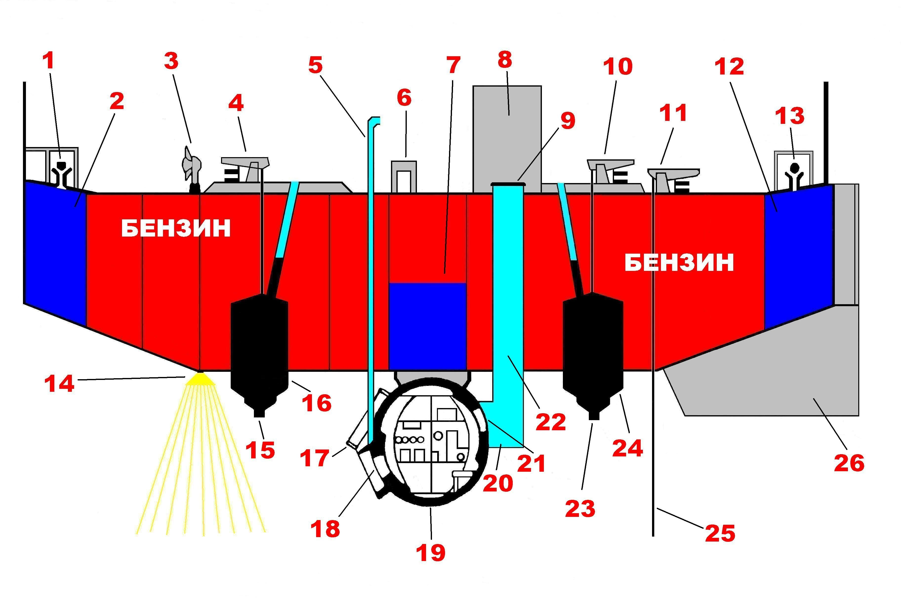 Trieste (submarine, 1953)